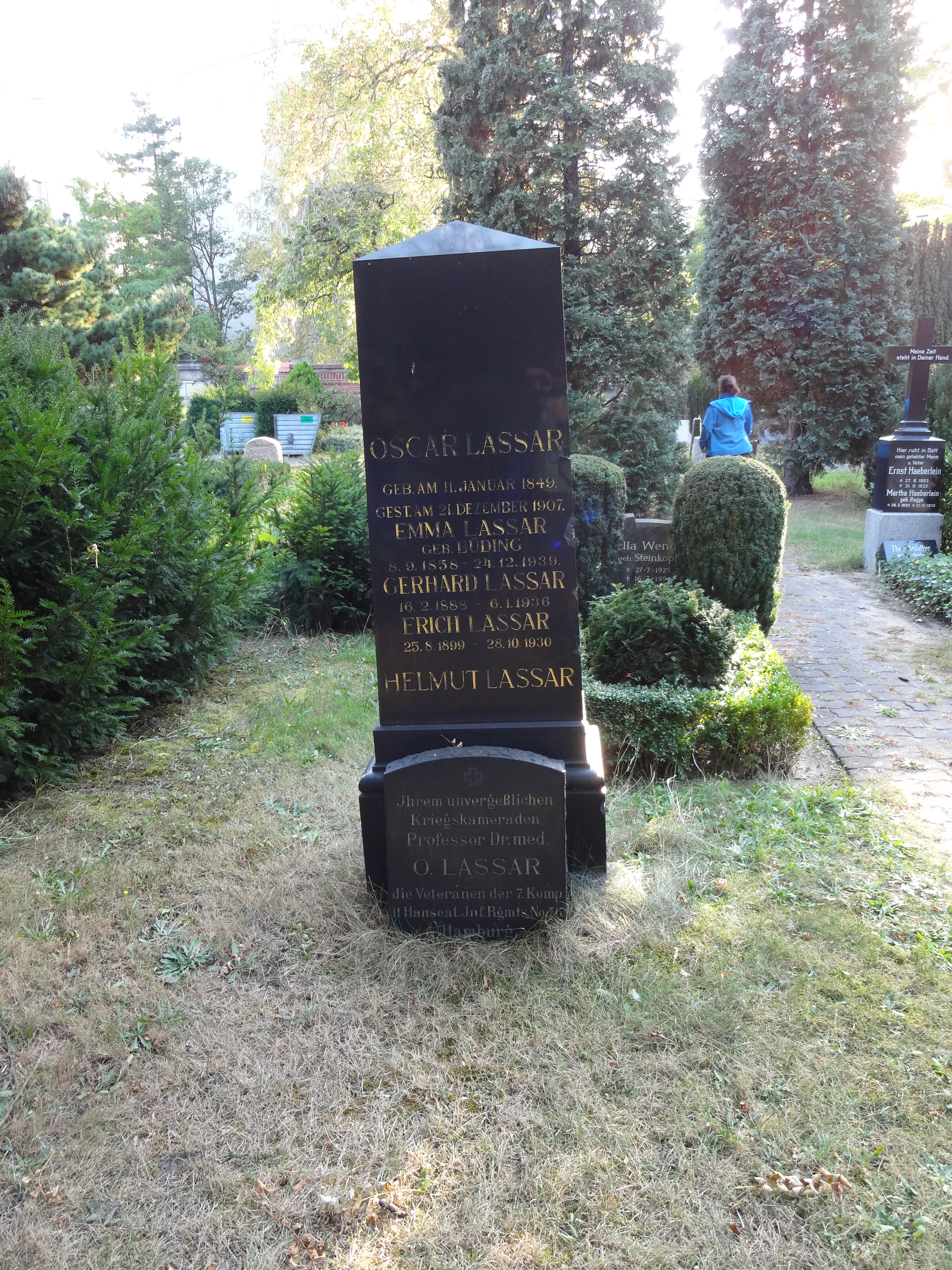 Grab Professor Oscar Lassar auf dem Dorotheenstädtischen Friedhof II in der Liesenstraße in Berlin